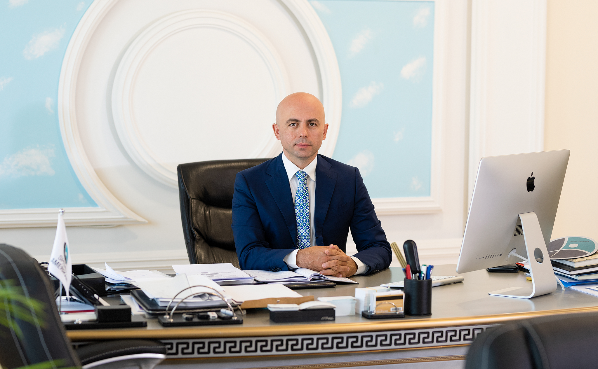 Klodian Allajbeu është një sipërmarrës me vendlindje në Berat dhe themelues i Spitalit Amerikan në Shqipëri dhe Kosovë.